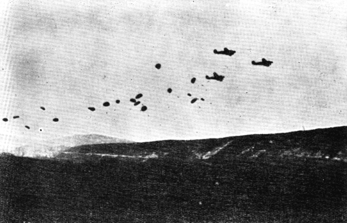 Srpskohrvatski / српскохрватски: Avioni izbacuju nemačke padobrance na Drvar.